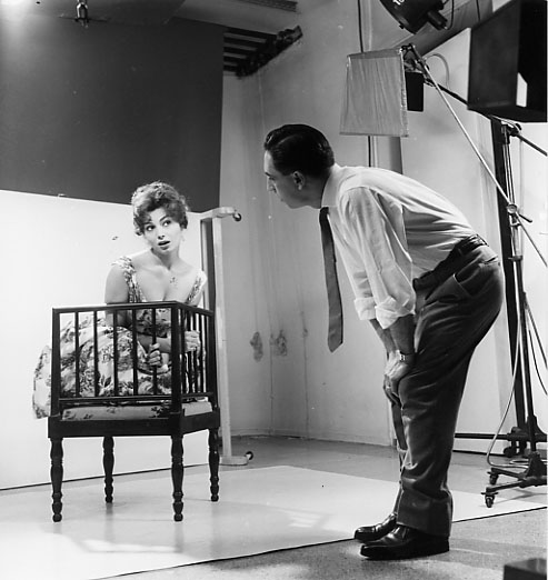 TUllio Farabola fotografa Gina Lollobrigida in sala di posa